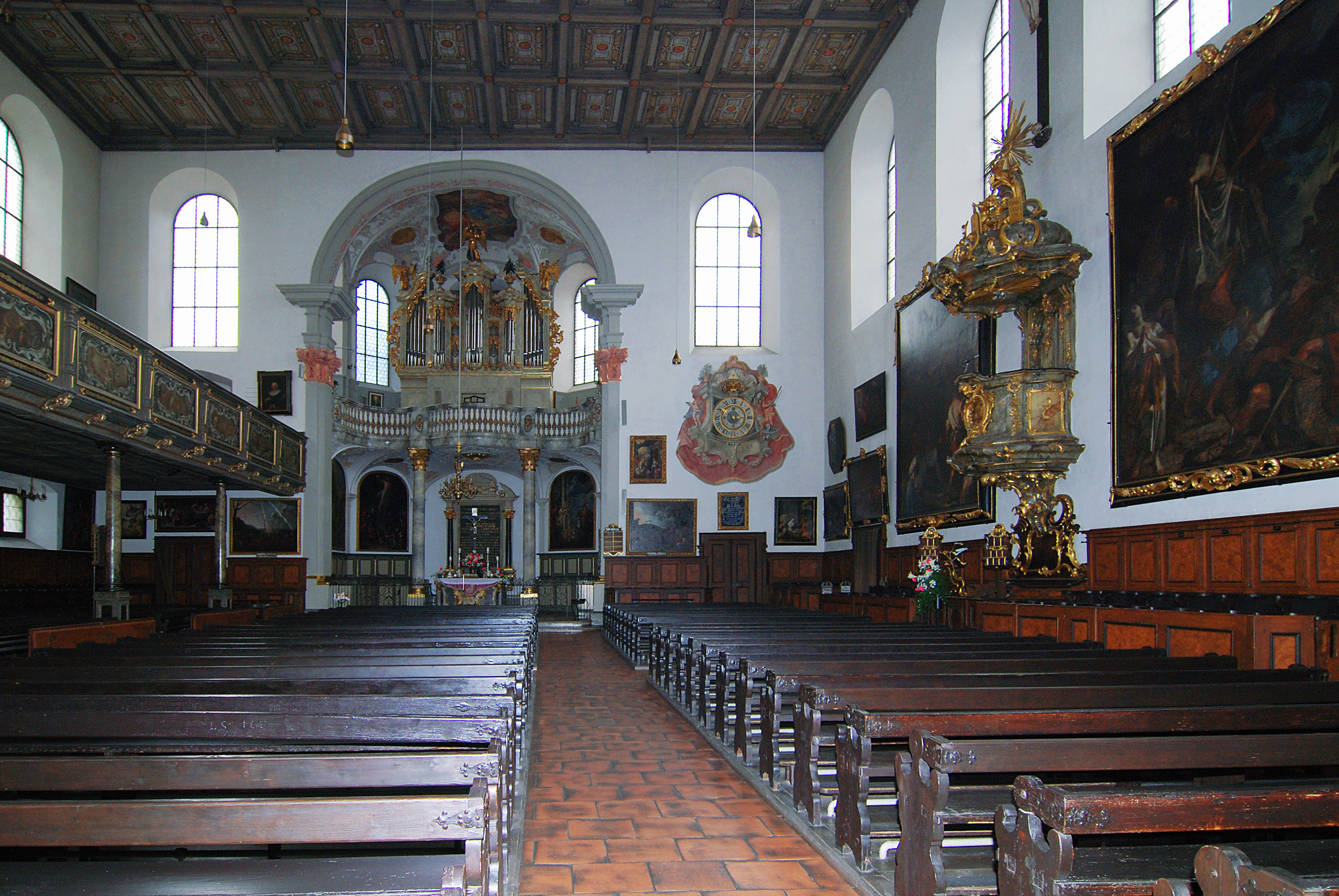 Die Evang.Luth. Heilig-Kreuz Kirche zu Augsburg gilt als Europäische Friedenskirche mit Luthertradition 1511+1518